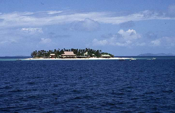 Beachcomber Island Sonstiges: Nikon F601